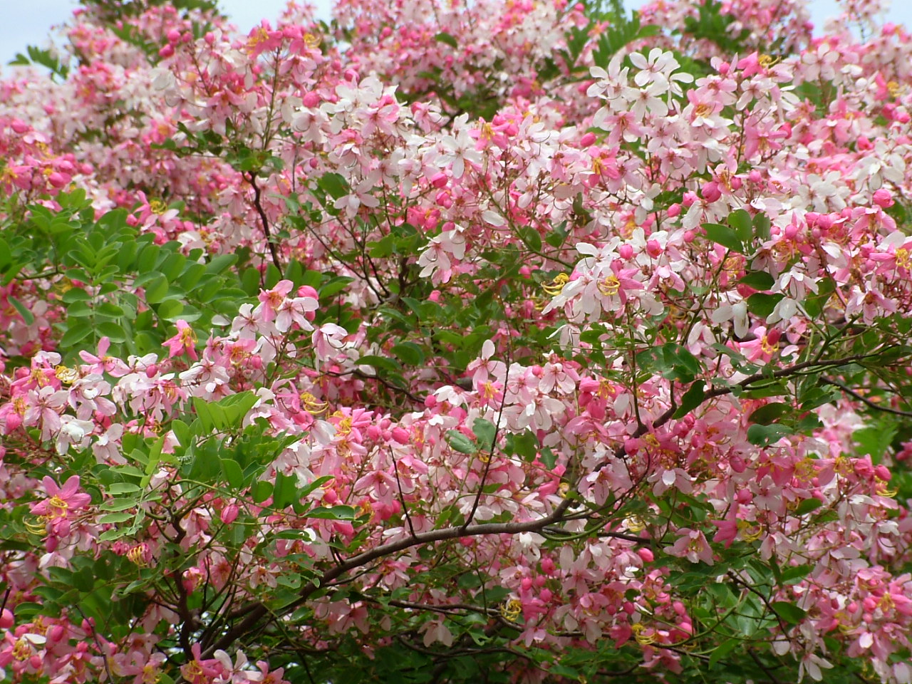 Muồng hoa đào Cassia javanica L. thuộc họ Đậu (Fabaceae)